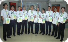 TORCY 2007 Awardees